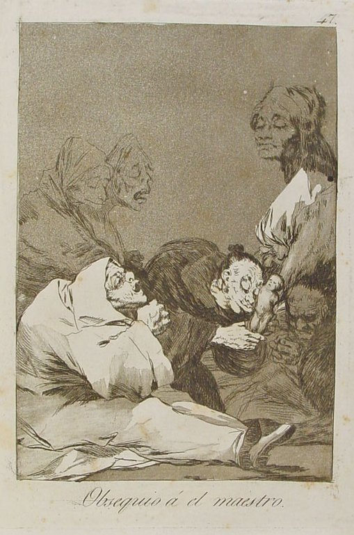 Capricho nº 47: Obsequio al maestro de Goya, serie Los Caprichos